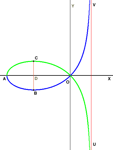 Декартов лист, Декартов лист в преобразованной системе координат